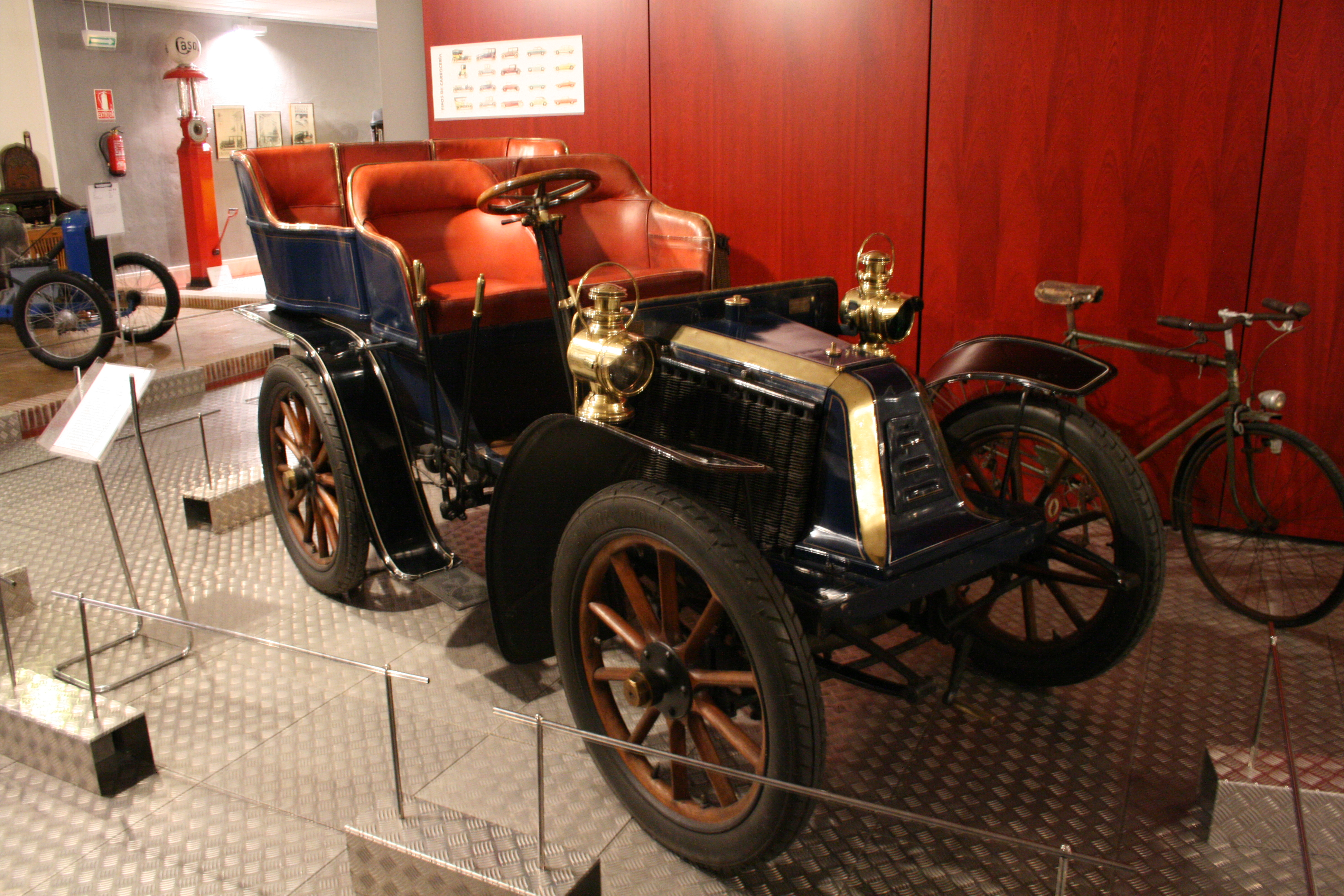 Renault 1902 Modelo G